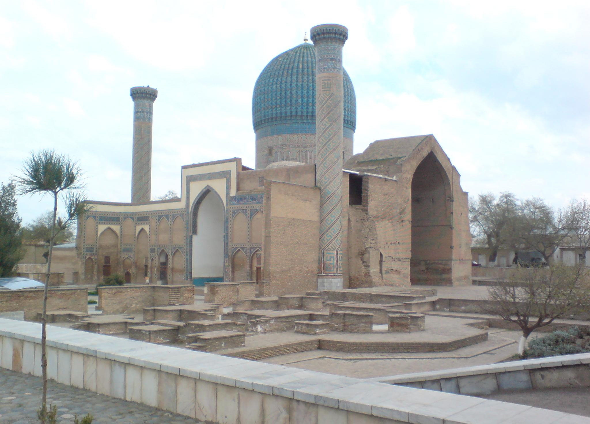 Мавзолей Гур Эмир.